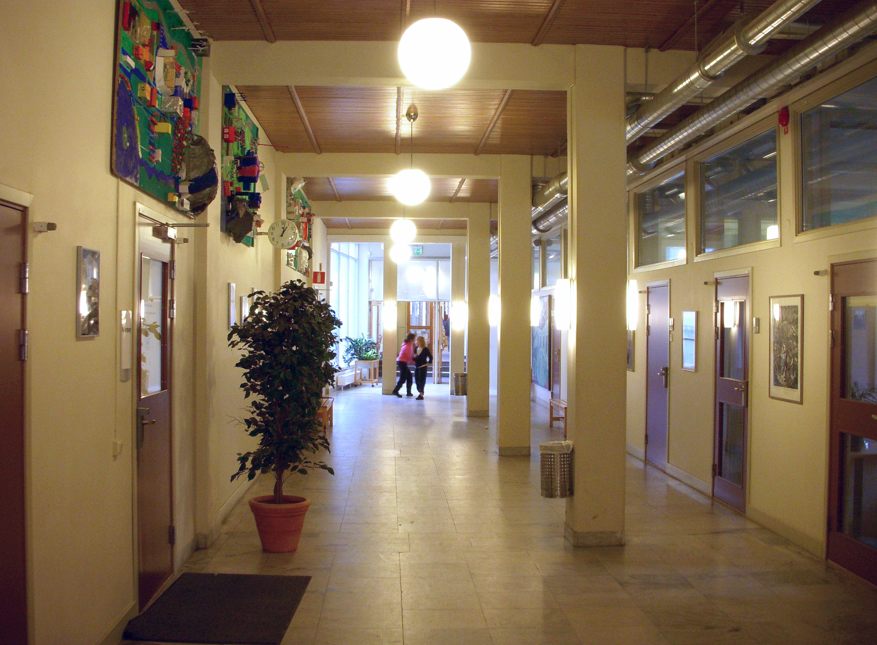 Nya Elementar, Bromma, korridor